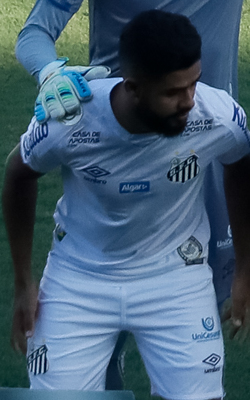 (Santos - SP, 16/11/2019) Partida de futebol Santos e São Paulo na Vila Belmiro. Foto: Isac Nóbrega/PR